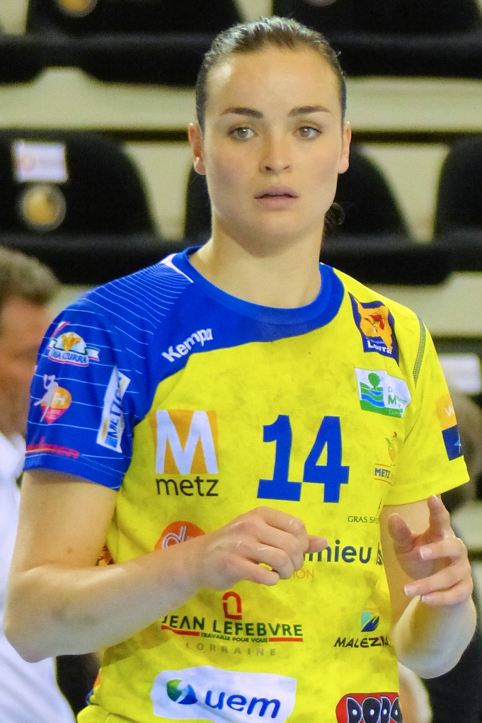 Yvette Broch pivot de l'équipe du Metz Handball, le 28 mai 2014, lors de la finale aller du Championnat de France face à Issy Paris Hand.